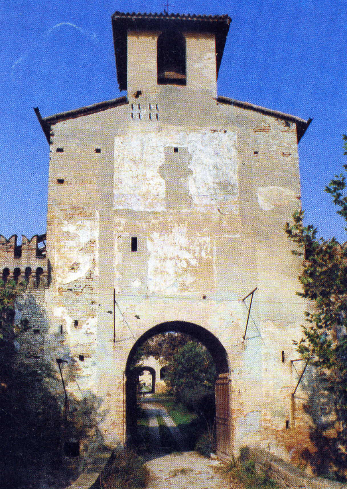 Fonte